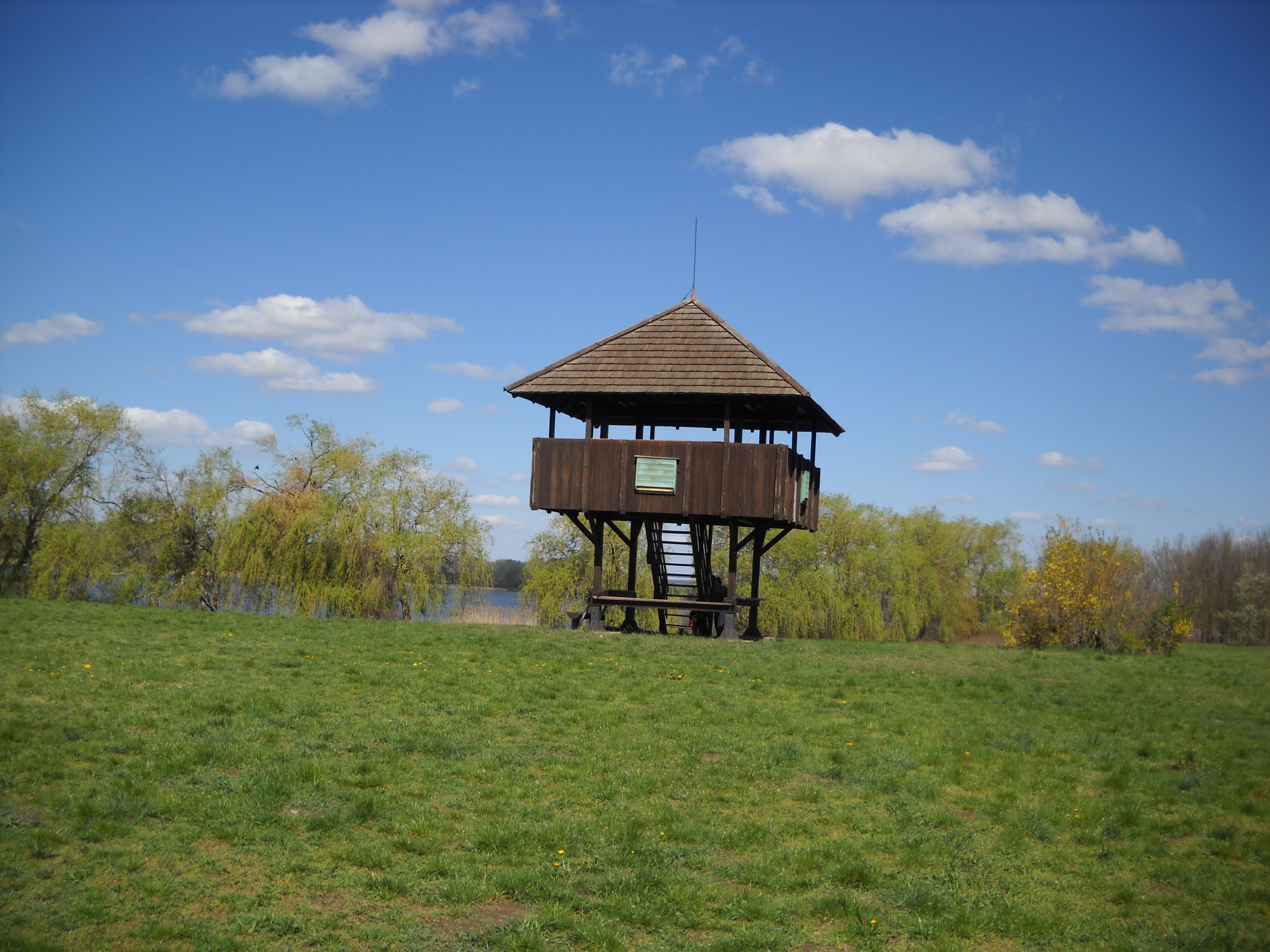 kilátó a Kányavári szigeten (observation on the island "Kányavári")